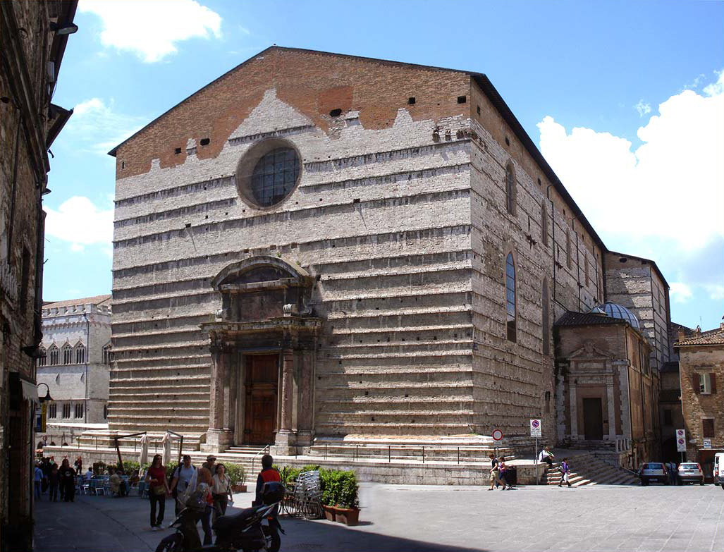 Catedral de Perugia